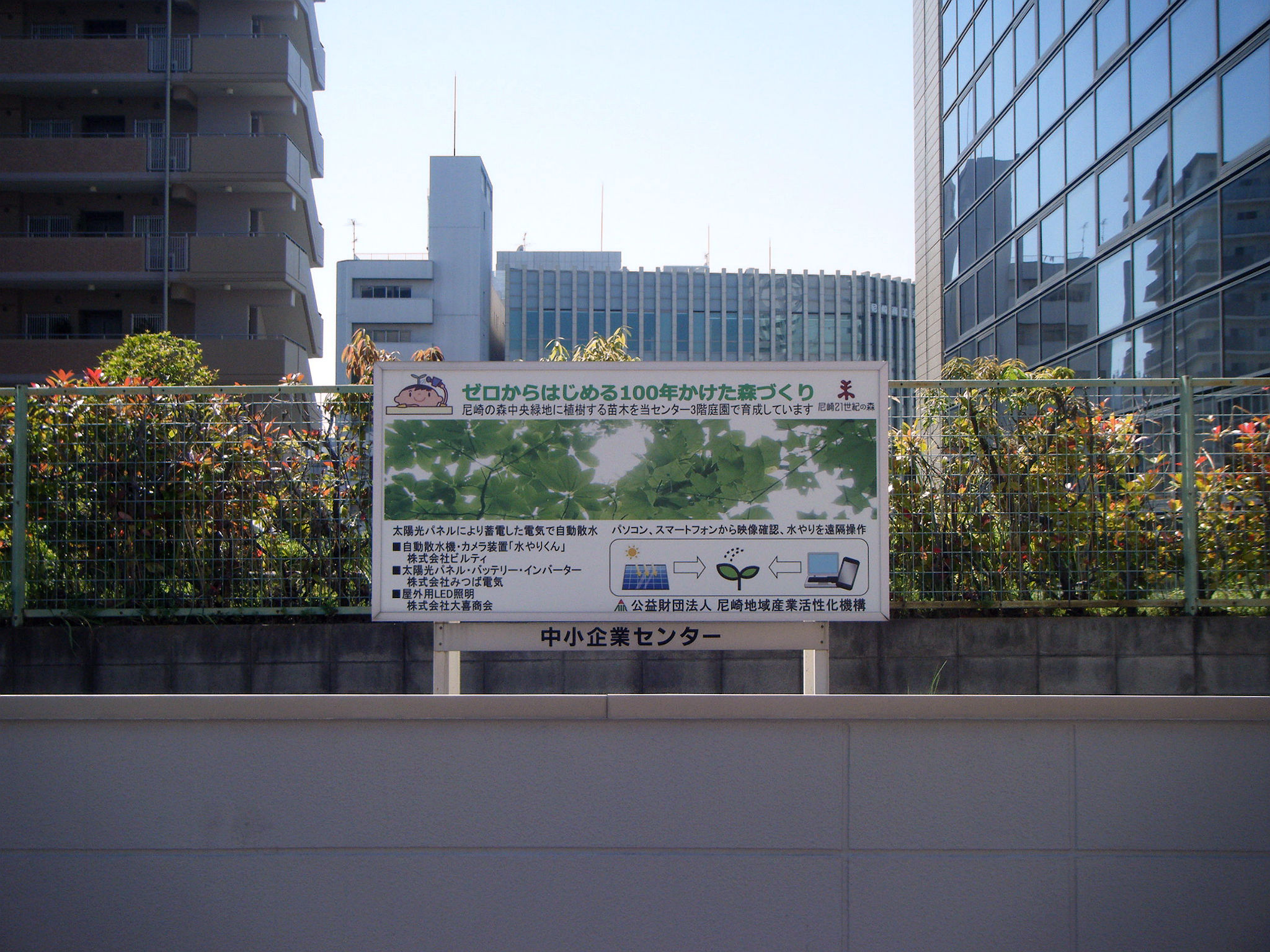 尼崎の森中央緑地 苗木の里親 尼崎市中小企業センター